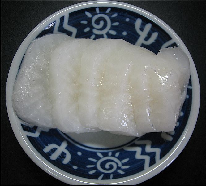 Buttarazuke (A japanese pickled daikon.) べったら漬け。